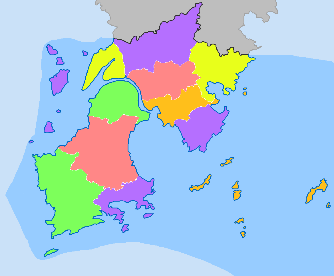 中文（中国大陆）: 玉环市分乡镇地图